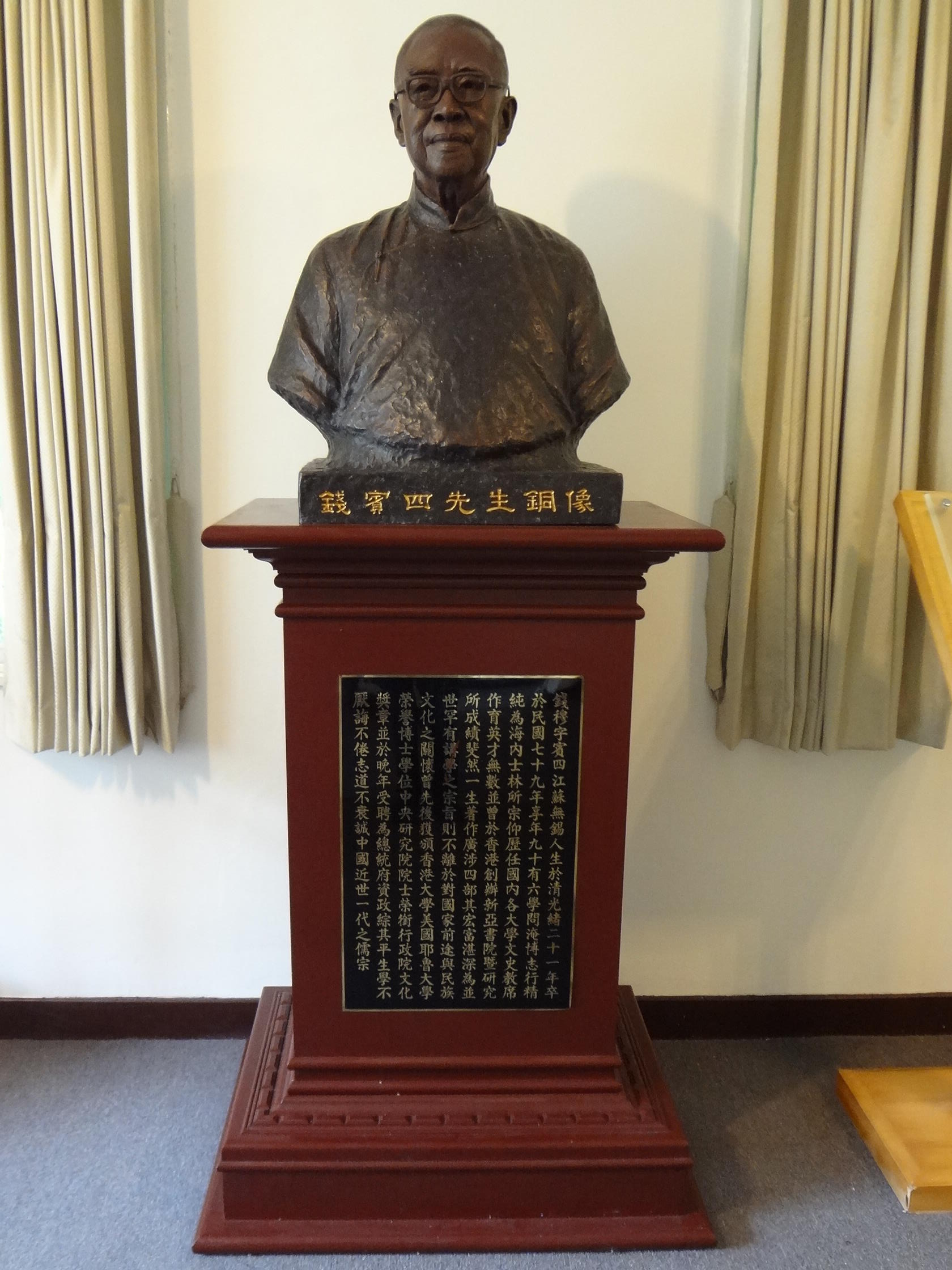 錢穆故居展示的錢穆銅像